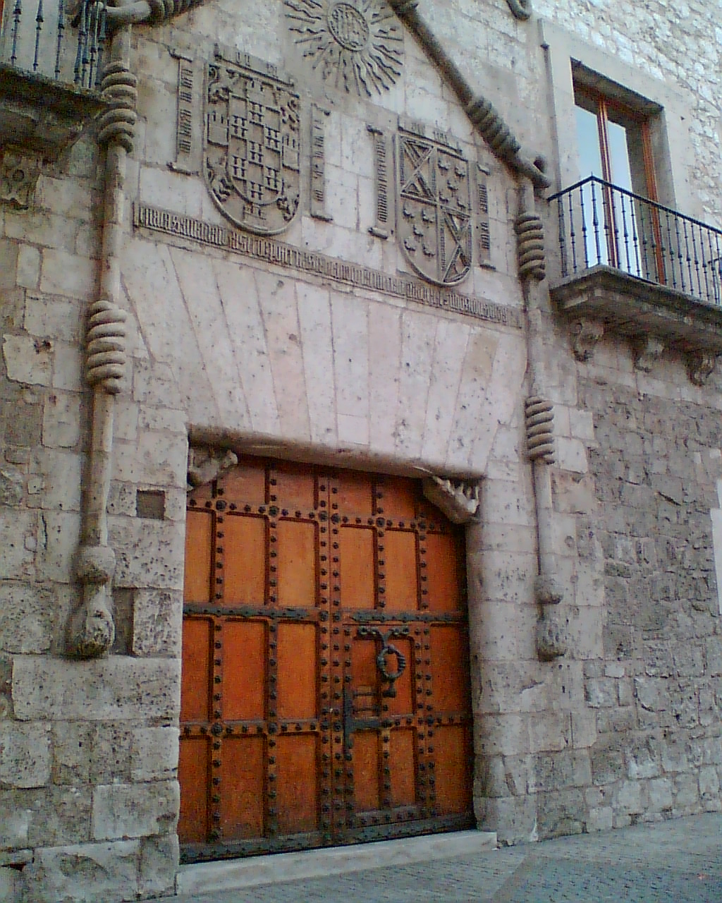 Puerta de la Casa del Cordón (Burgos) en 2005 Tomada: 16/09/2005 Cámara: Nokia 6230i